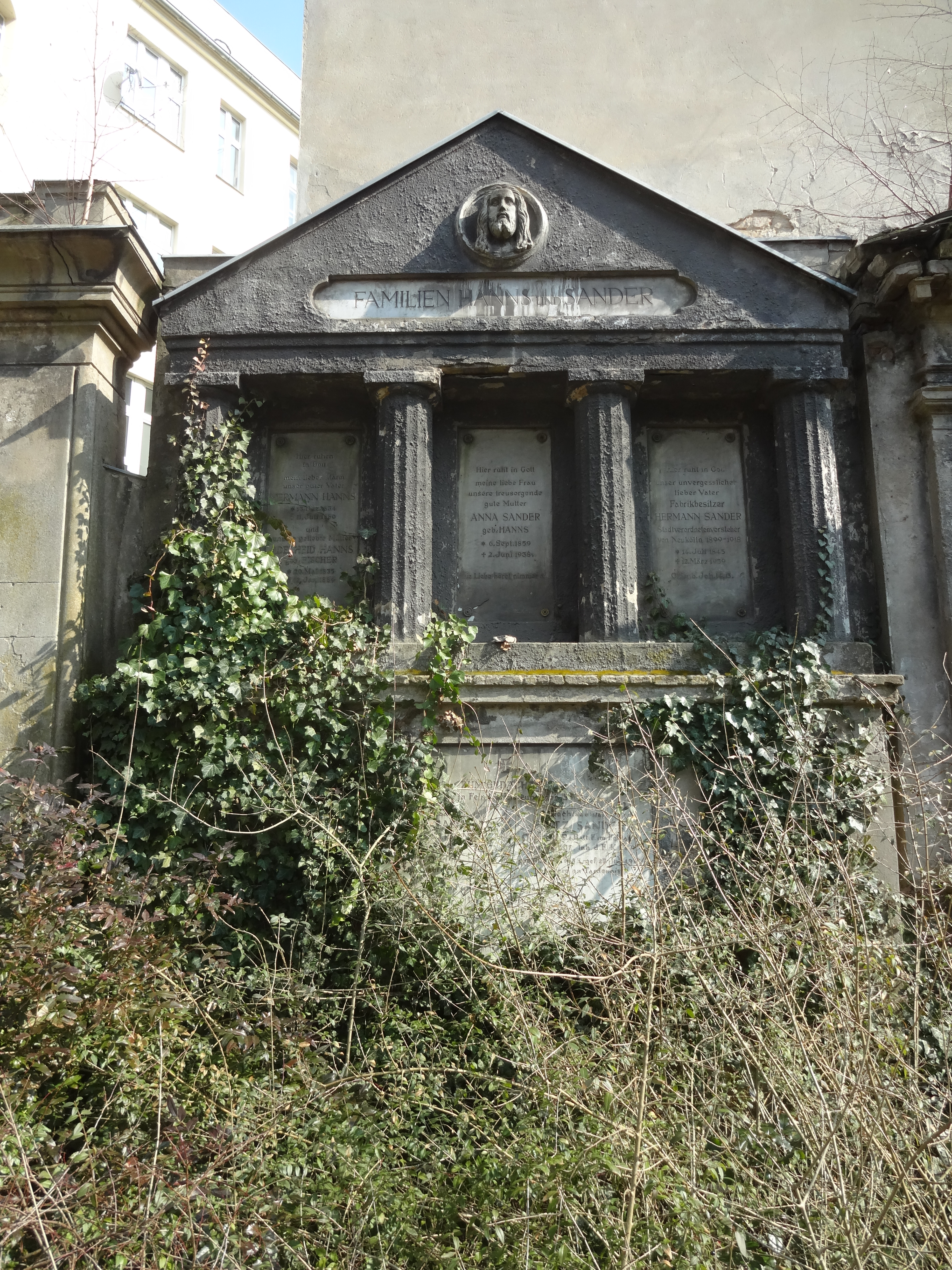 Grab von Hermann Sander auf dem Alten St.-Jacobi-Friedhof in Berlin